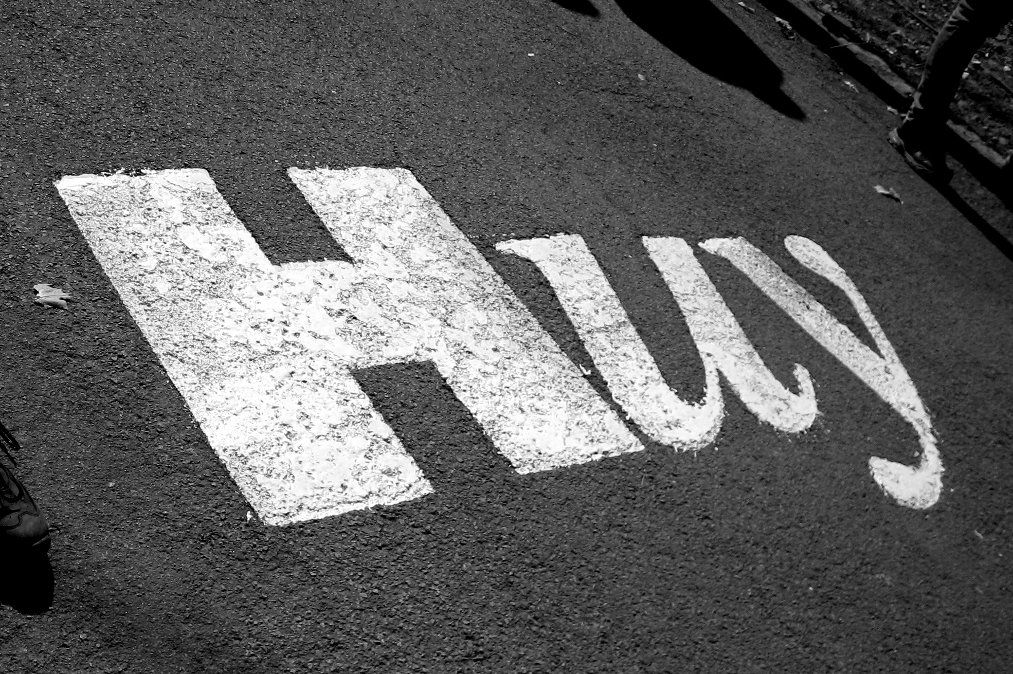 Muur van Hoei in de Waalse Pijl 2017